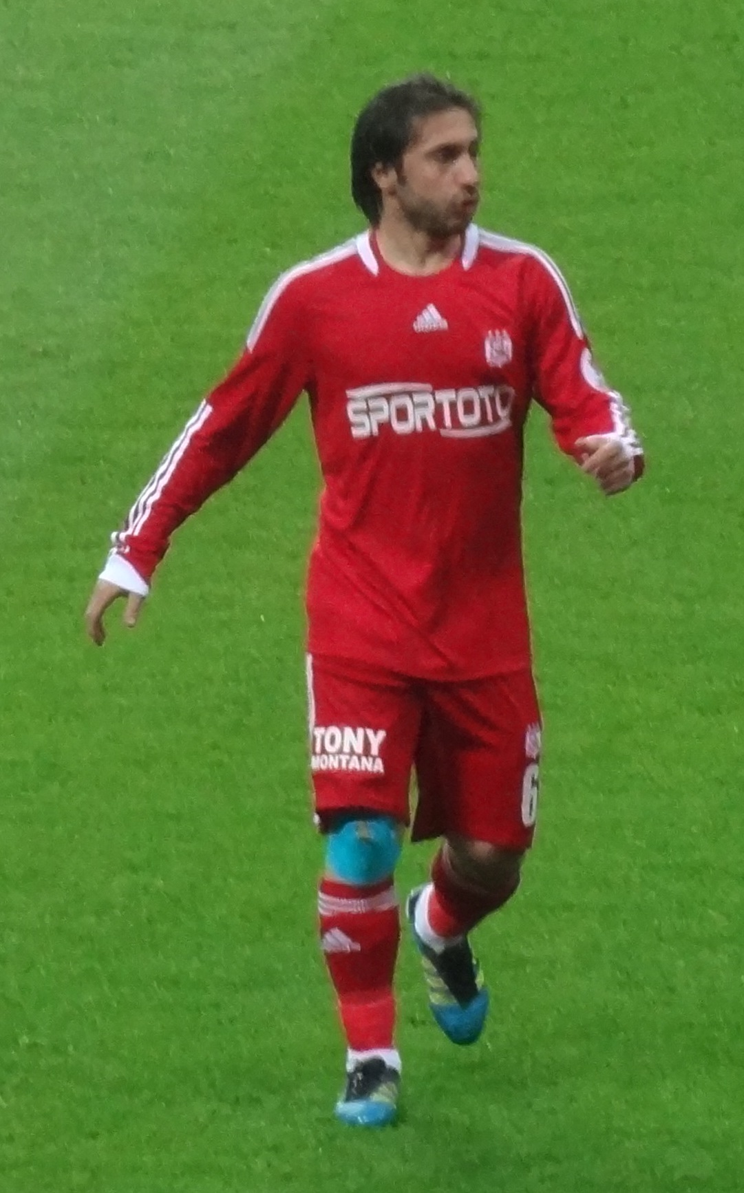 Mehmet Galatasaray'a karşı oynarken